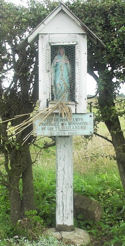 Frettemeule, Somme, France, oratoire à la Vierge des champs.